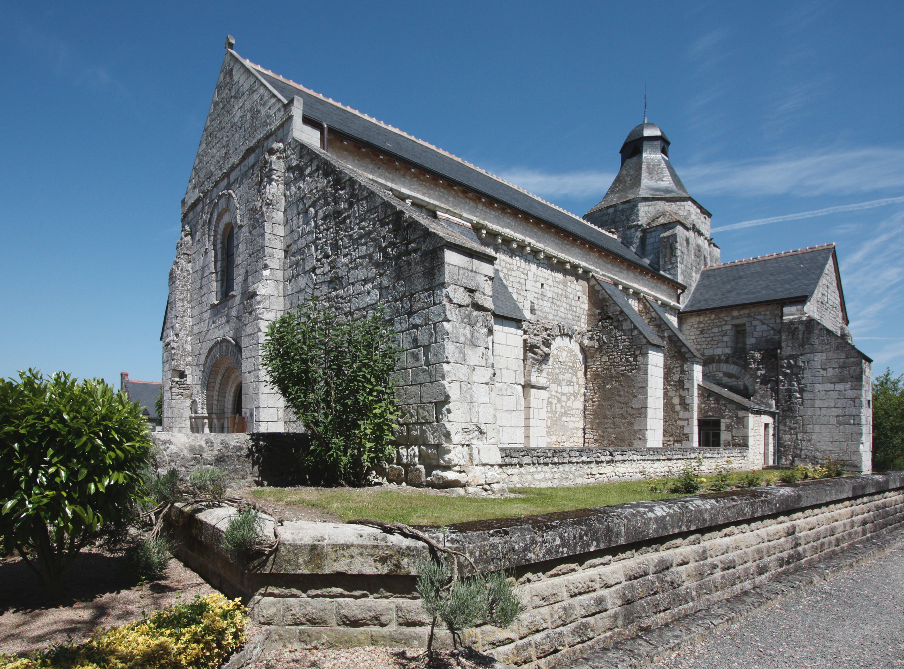 Tavant im Département Indre-et-Loire/Frankreich - Dorfkirche Saint-Nicolas.